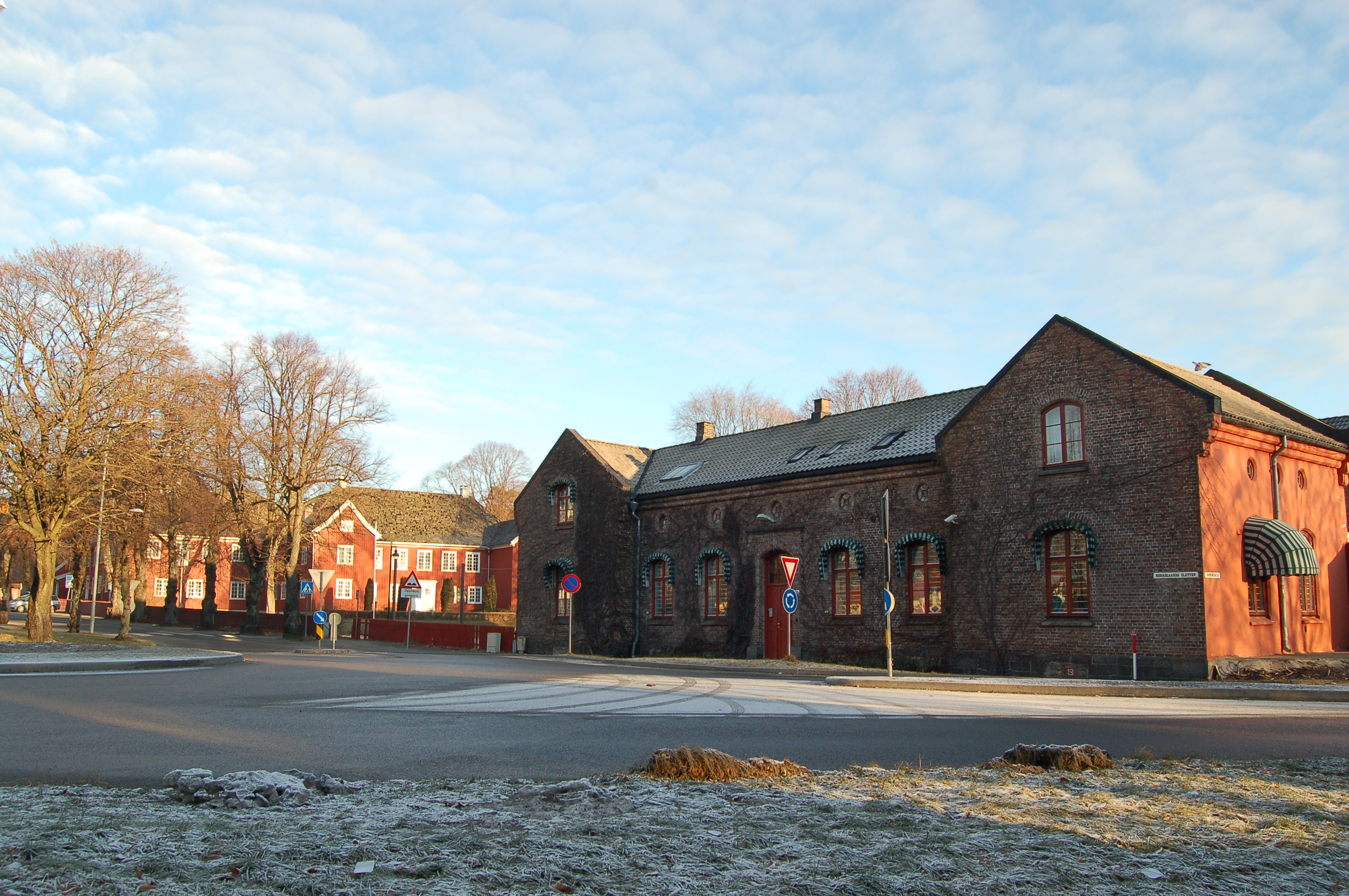 Herregårdssletta i Larvik, med fengselet (nærmest) og Herregården.